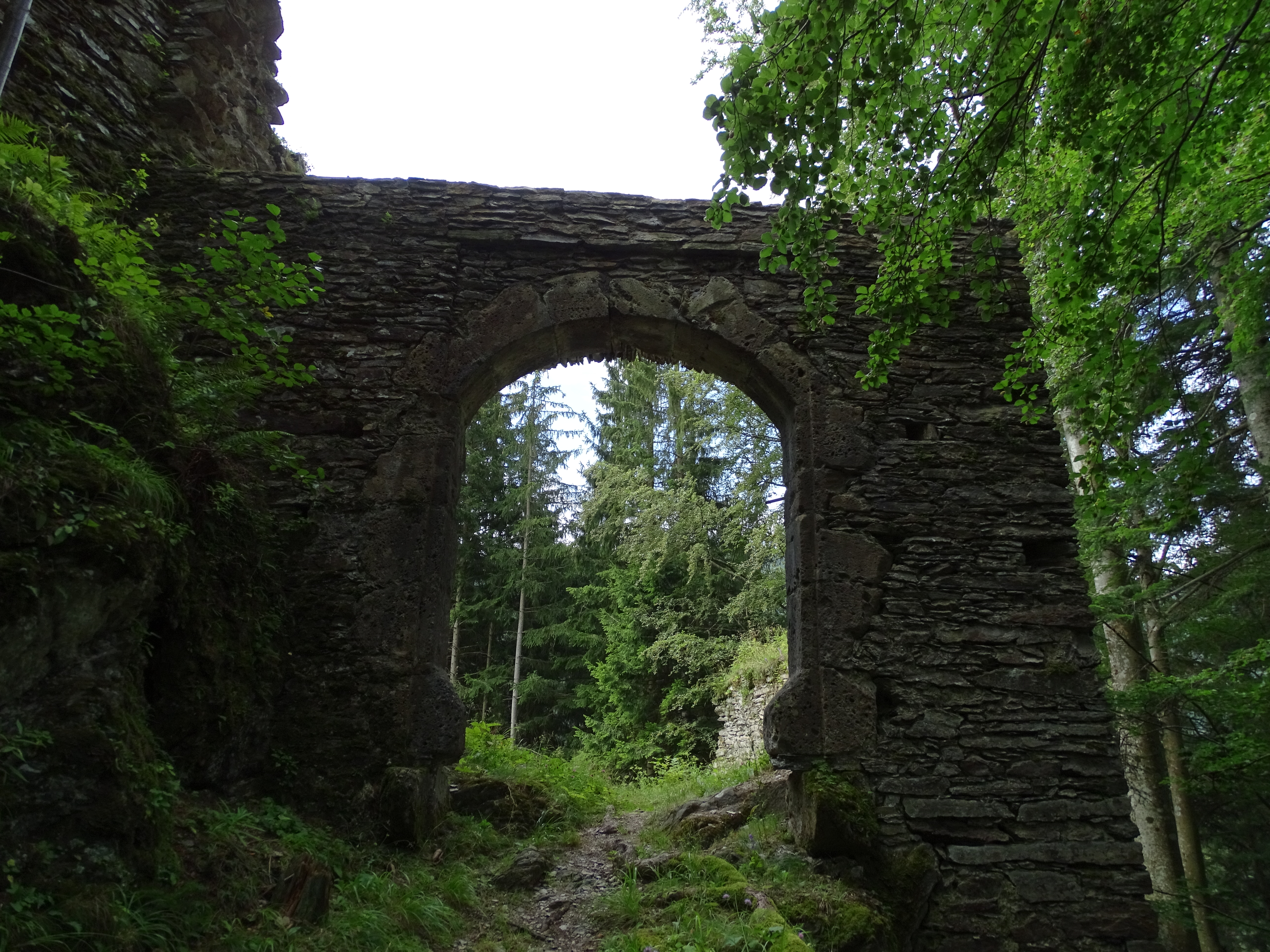 Der Zugang zum Zwinger der Burg Hauenstein bei Gallmannsegg in der Gemeinde Kainach bei Voitsberg